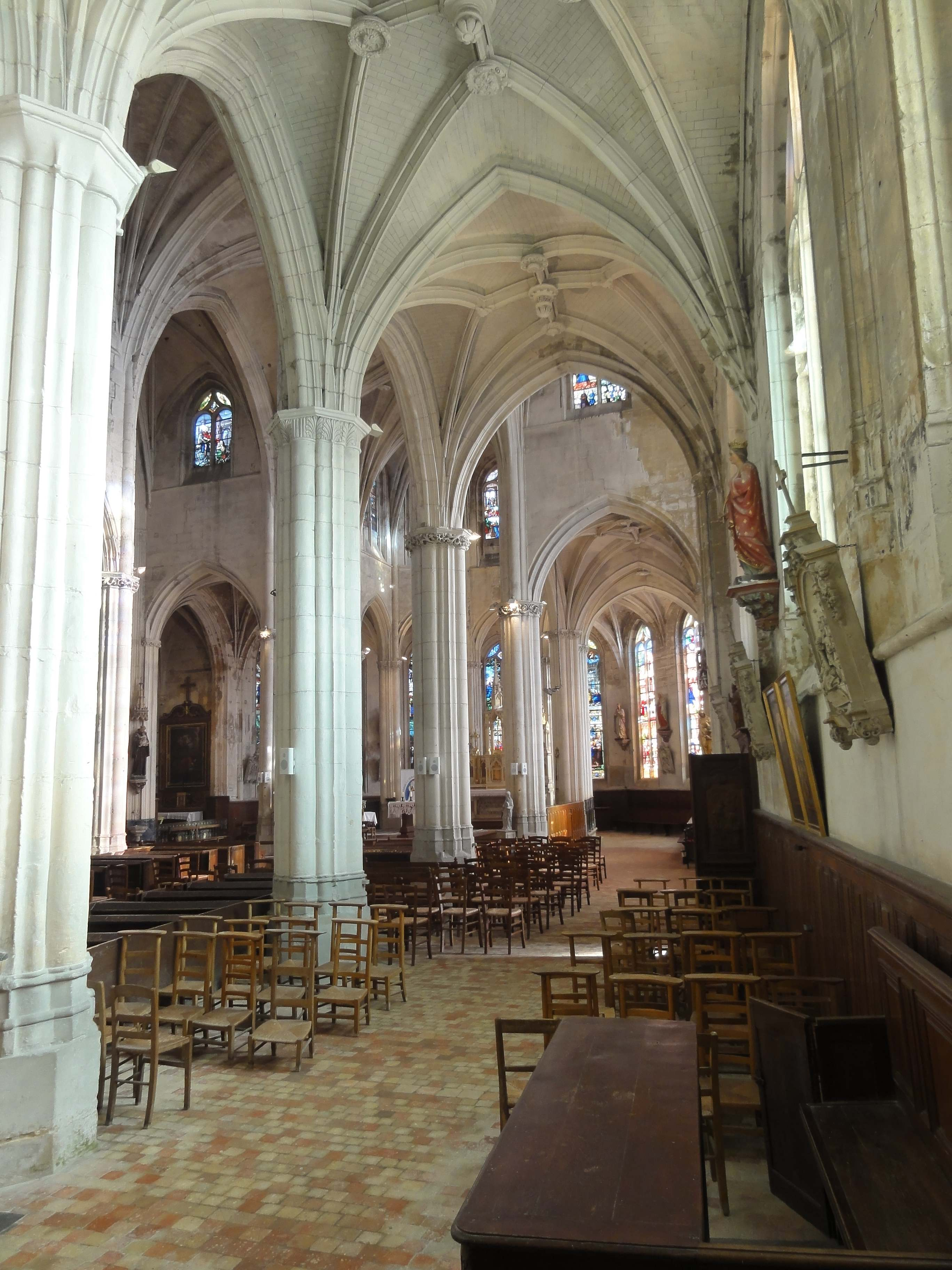 Intérieur de l'église - voir titre.